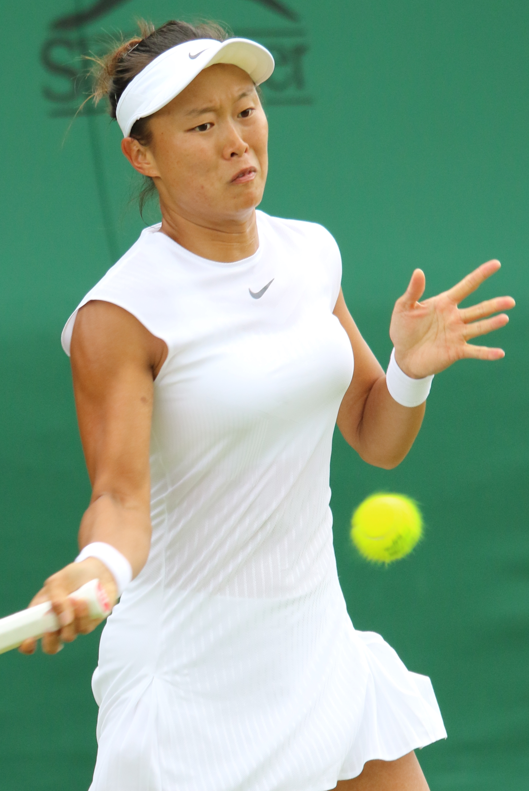 Chang K.C. WM17 (17)